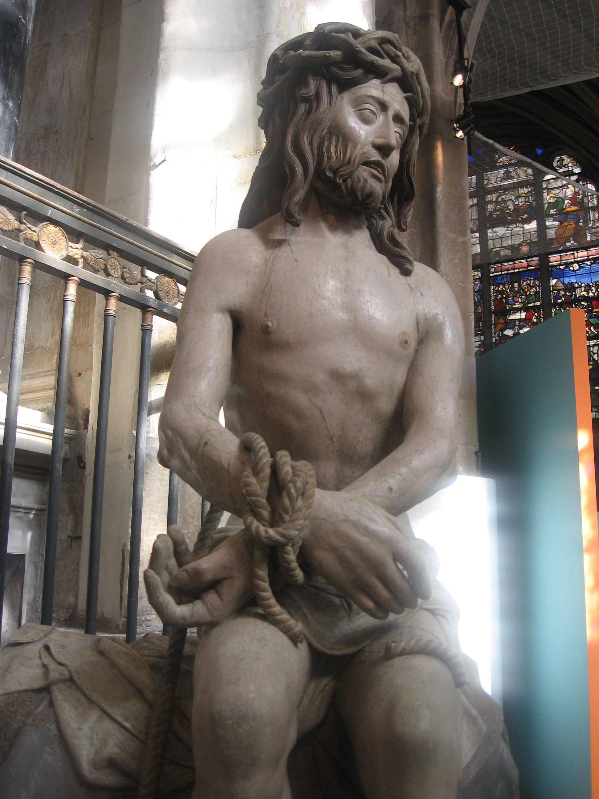 Exposition "Le Beau XVIe siècle". Christ de pitié de Mussy-sur-Seine 1509 (XVIe siècle) Statue